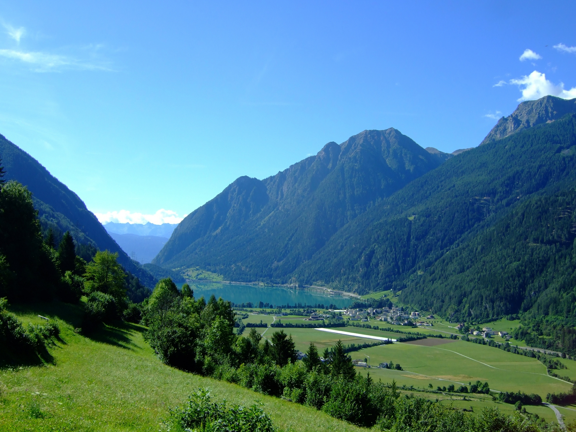 Blick auf den Lago di Poschiavo und die Fraktion Le Prese in der Gemeinde Poschiavo, Schweiz